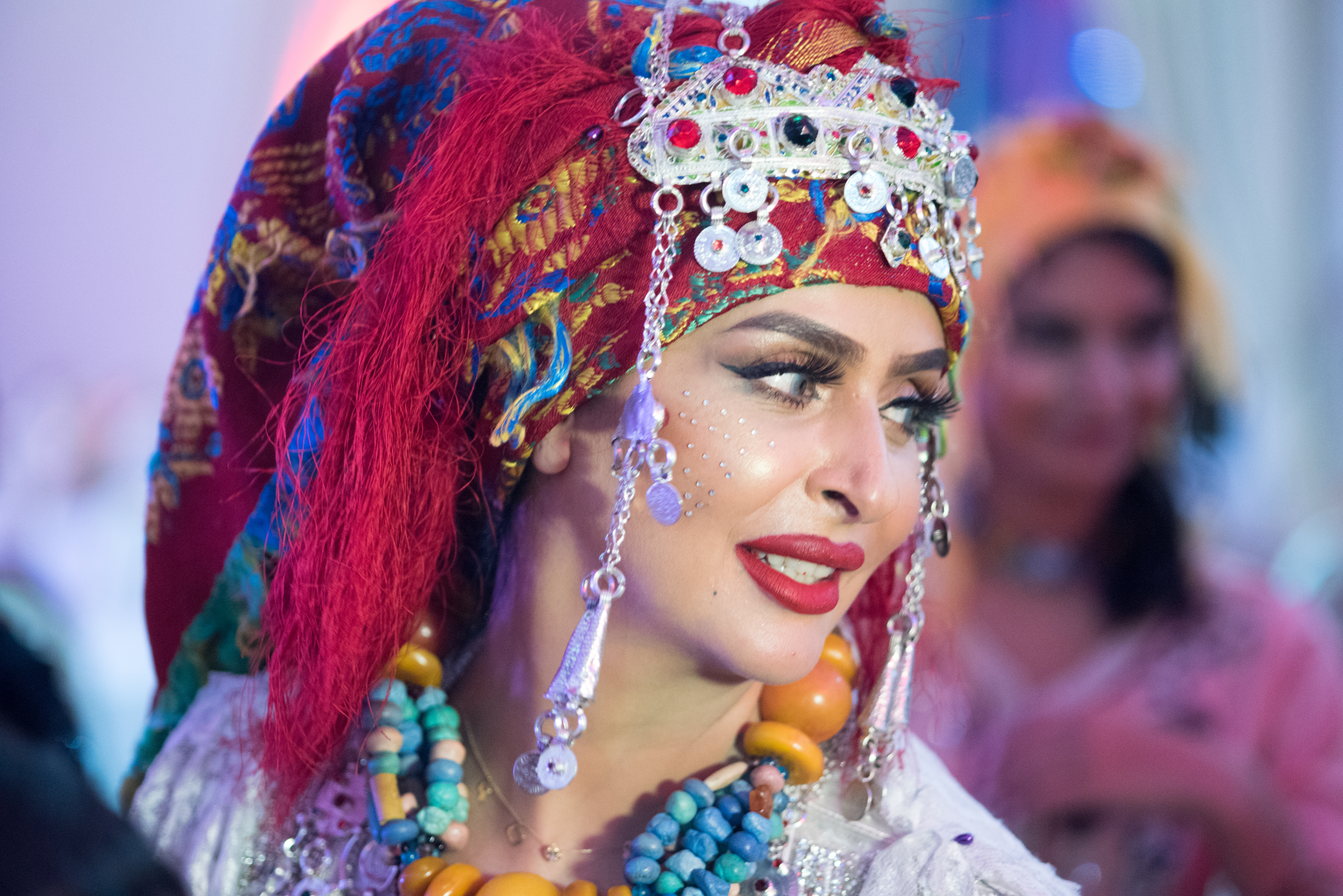 Beauté de la femme berbère lors d'un mariage moderne.